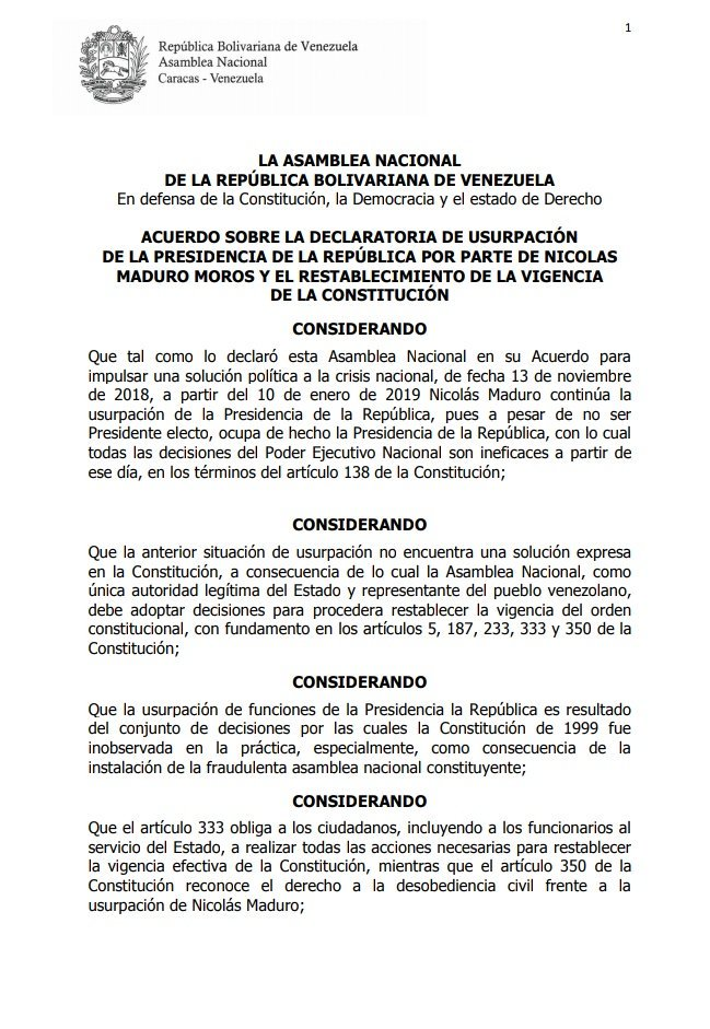 Acuerdo sobre la declaratoria de usurpación de la presidencia de la república por parte de Nicolas Maduro Moros y el restablecimiento de la vigencia de la constitución - Página 1